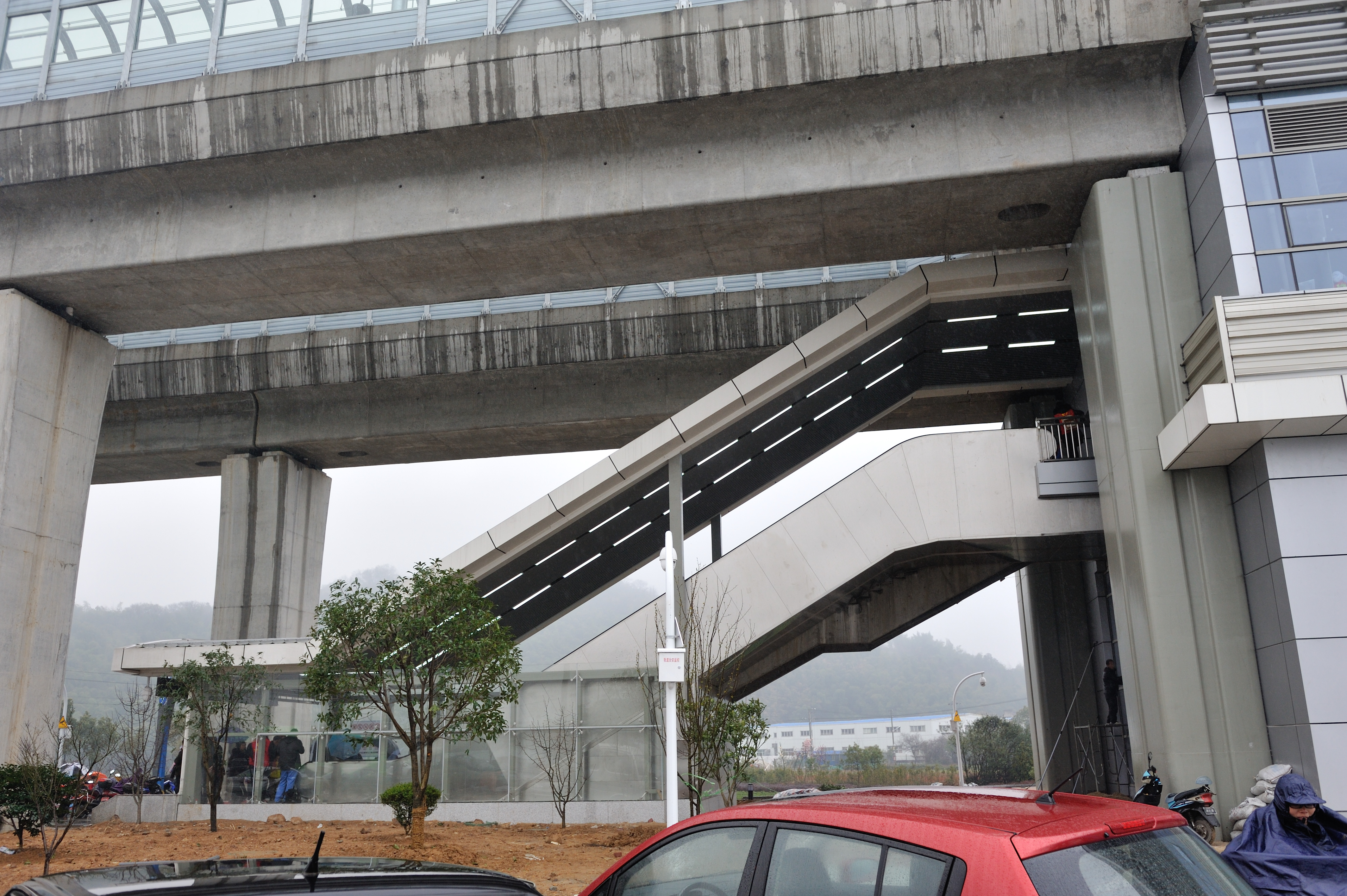 宁波地铁霞浦站